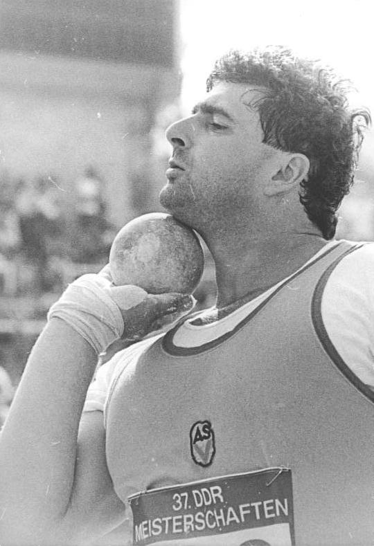 Udo Beyer ADN-ZB Kasper 27.6.86 Bez. Gera: 37. DDR-Meisterschaften der Leichtathleten in Jena- Udo Beyer (ASK Potsdam) wurde auf dem Jenaer Ernst-Abbe-Sportfeld DDR-Meister im Kugelstoßen mit dem Weltklasseergebnis von 22,14 m.